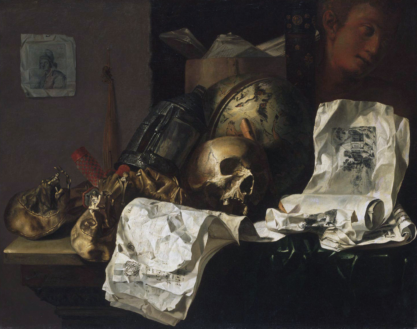 Vanitas